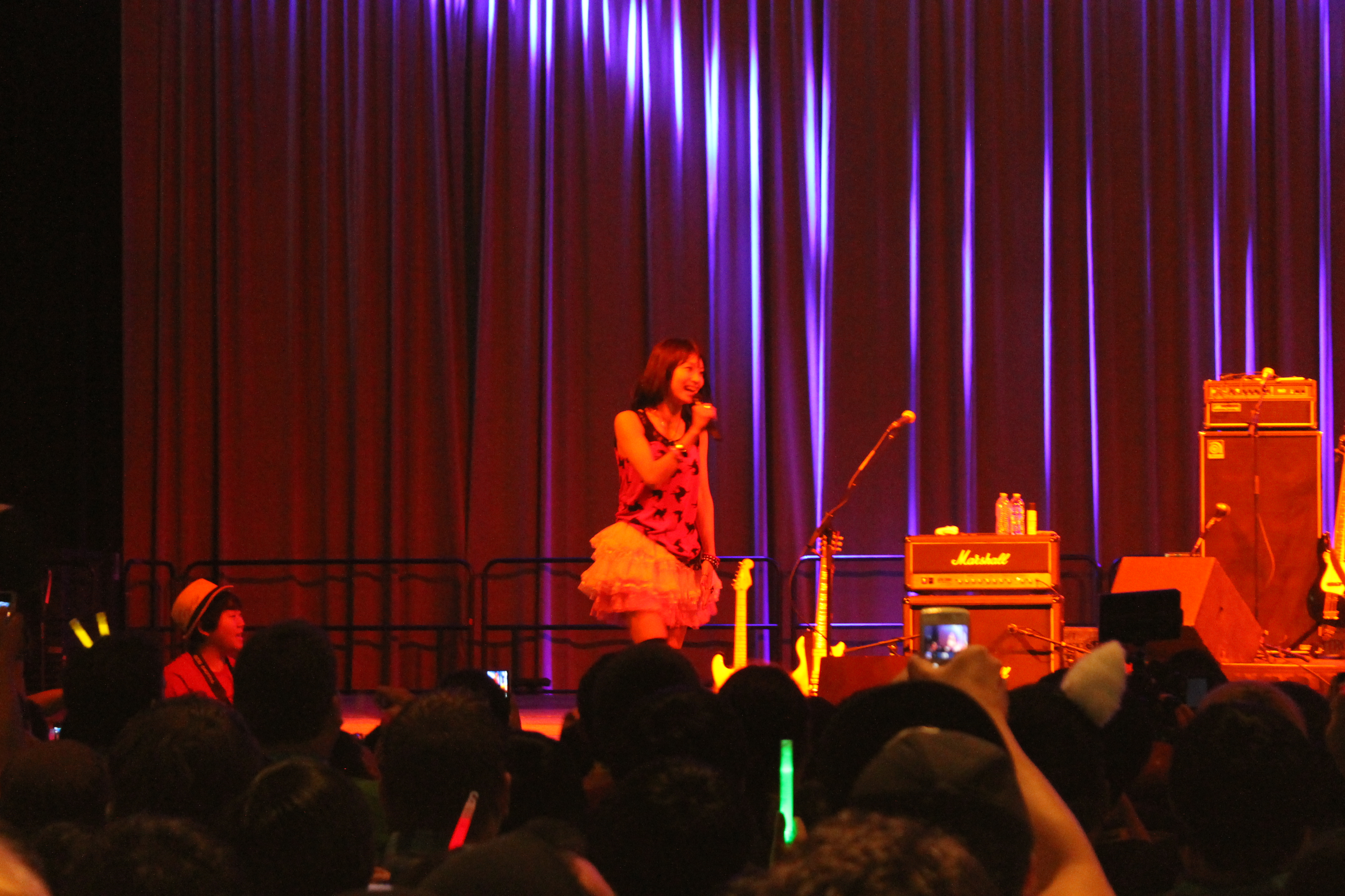 Anime Expo 2012 0827